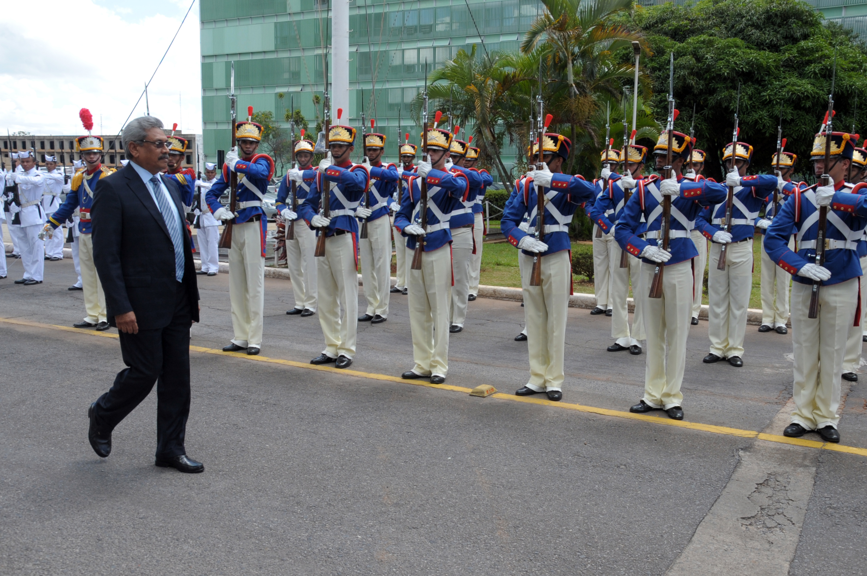 15/01/2014, Brasília - DF Fotos: Jorge Cardoso